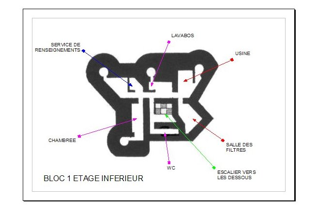 LA FERTE BLOC 1 ETAGE INFERIEUR.